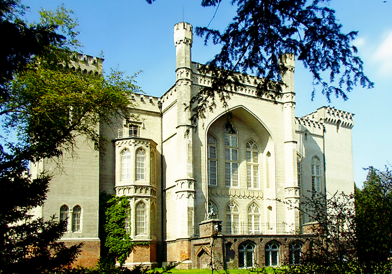 Zamek w Kórniku - widok na fasadę pałacu od strony ogrodu.